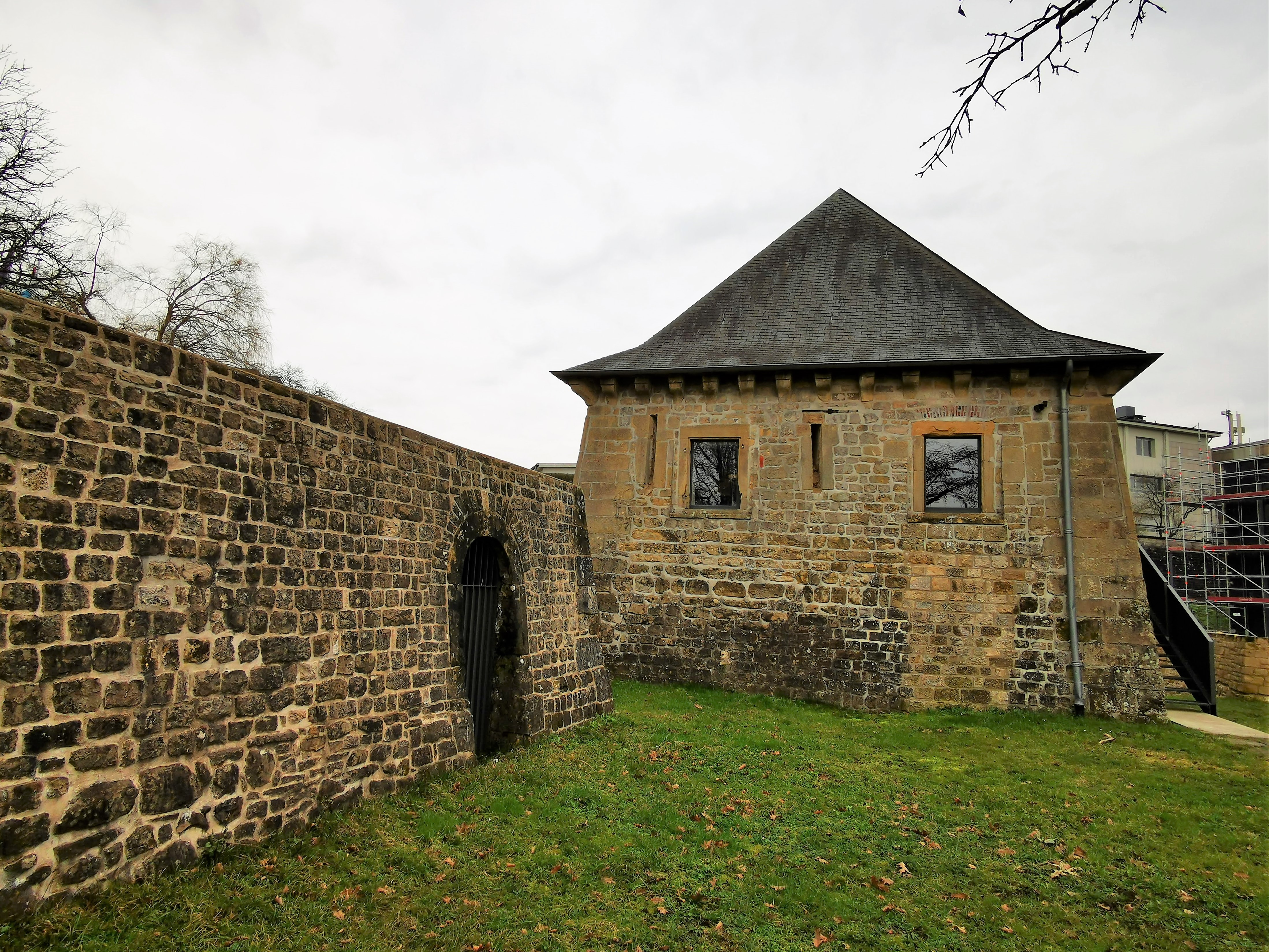 Luxembourg Fetschenhof. Le réduit du Fort Rubamprez restauré.